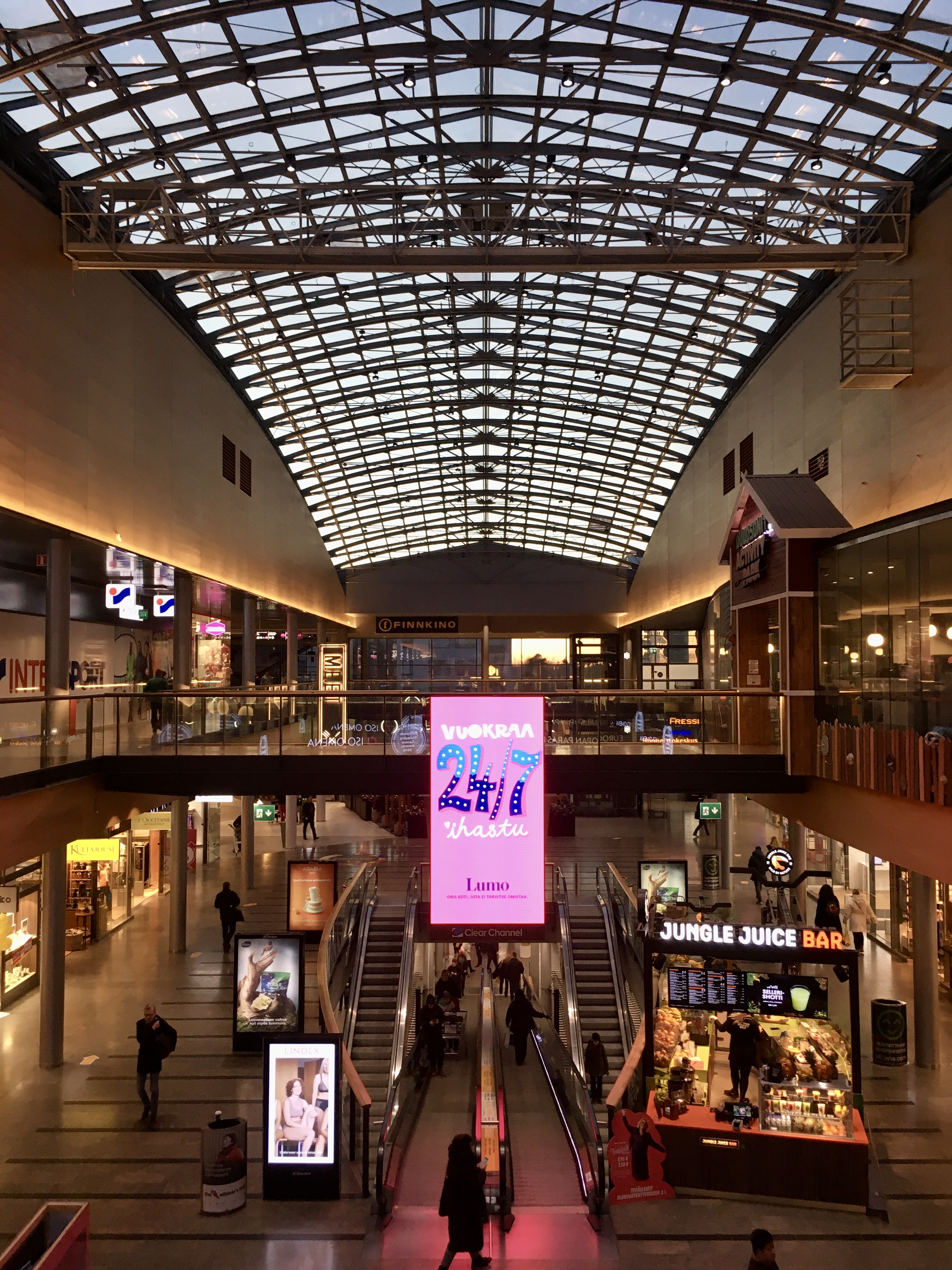 Iso Omena, Espoo, Suomi, January 2020